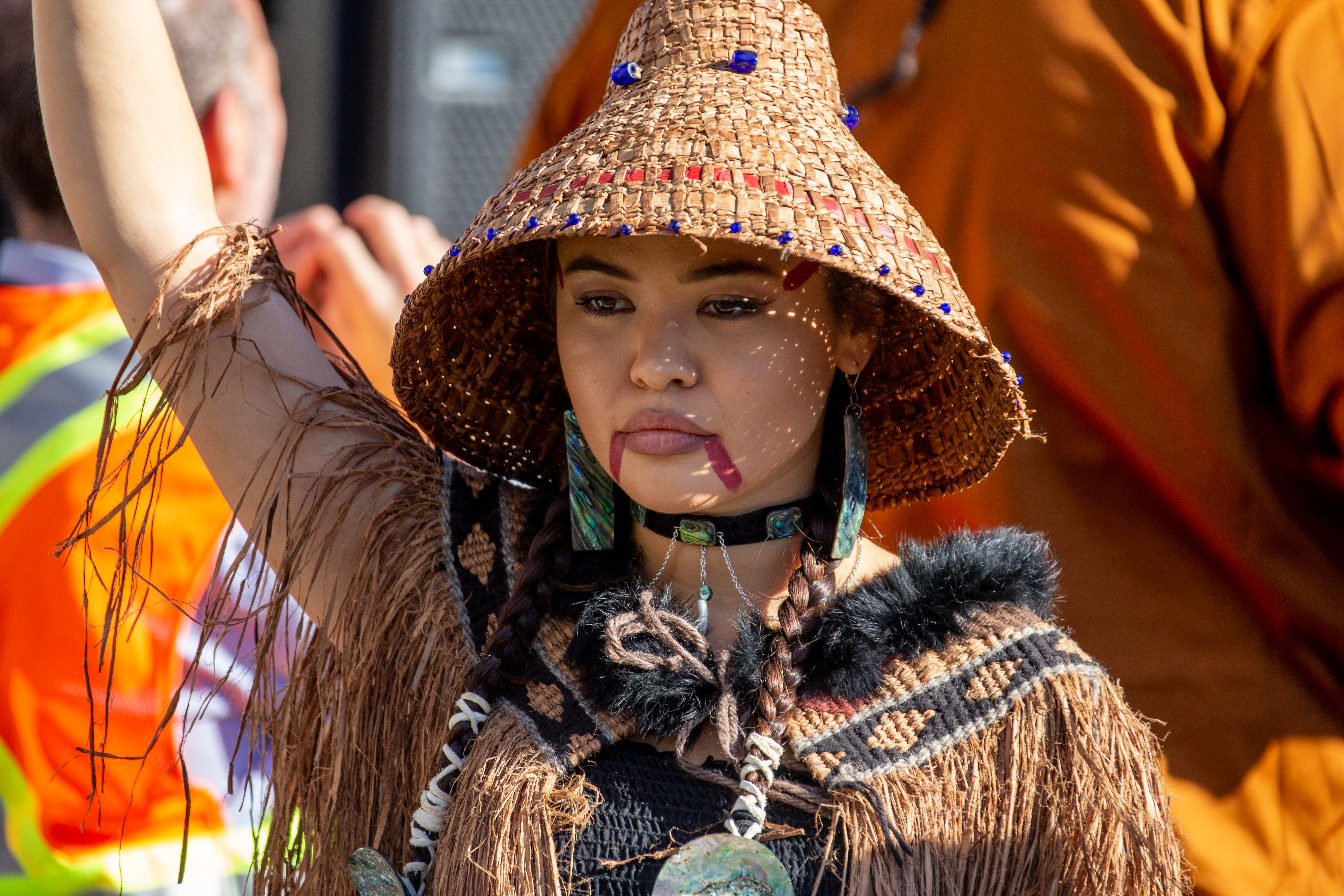 Ta'Kaiya Blaney à la marche pour le climat du 27 Sept 2019 à Montreal.